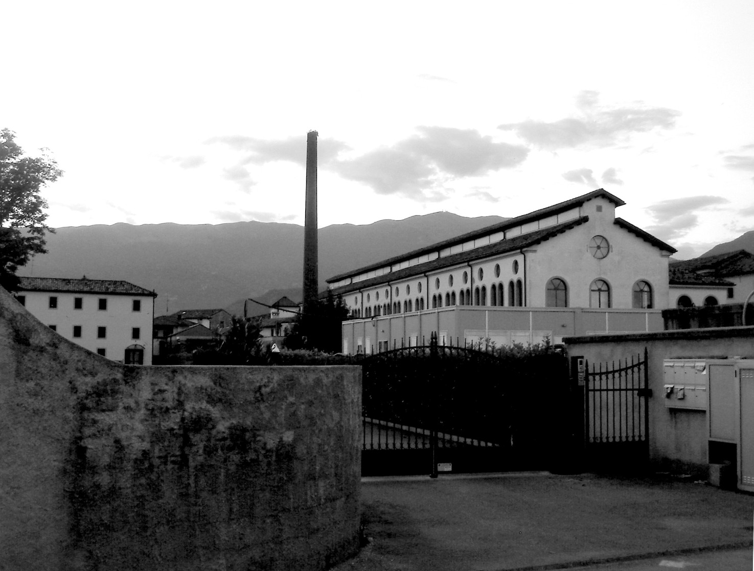 San Giacomo di Veglia (Vittorio Veneto, Treviso, Italia): vecchia filanda in via delle Filande, neorestaurata e in futuro adibita a museo del baco da seta.